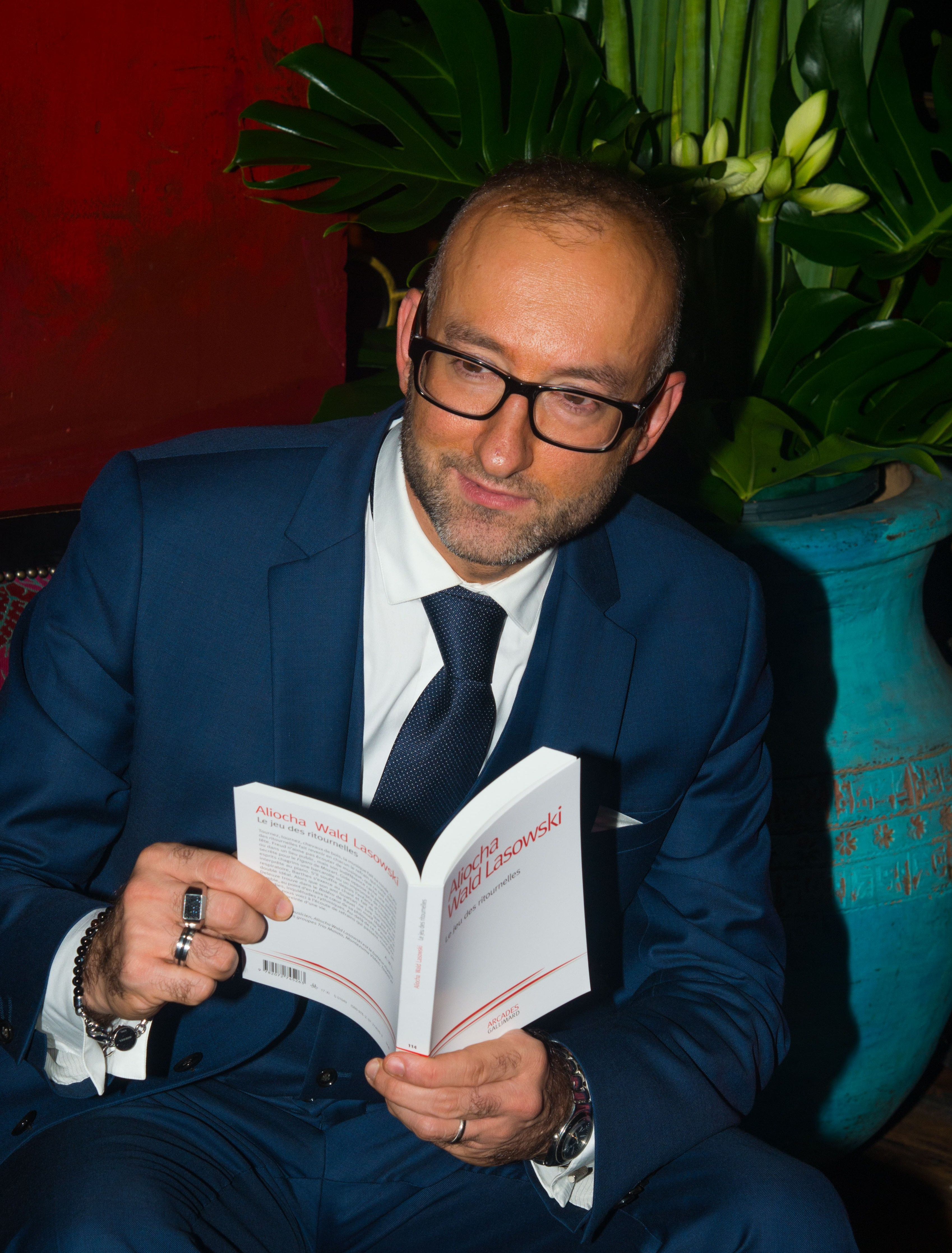 Aliocha Wald Lasowski en novembre 2017